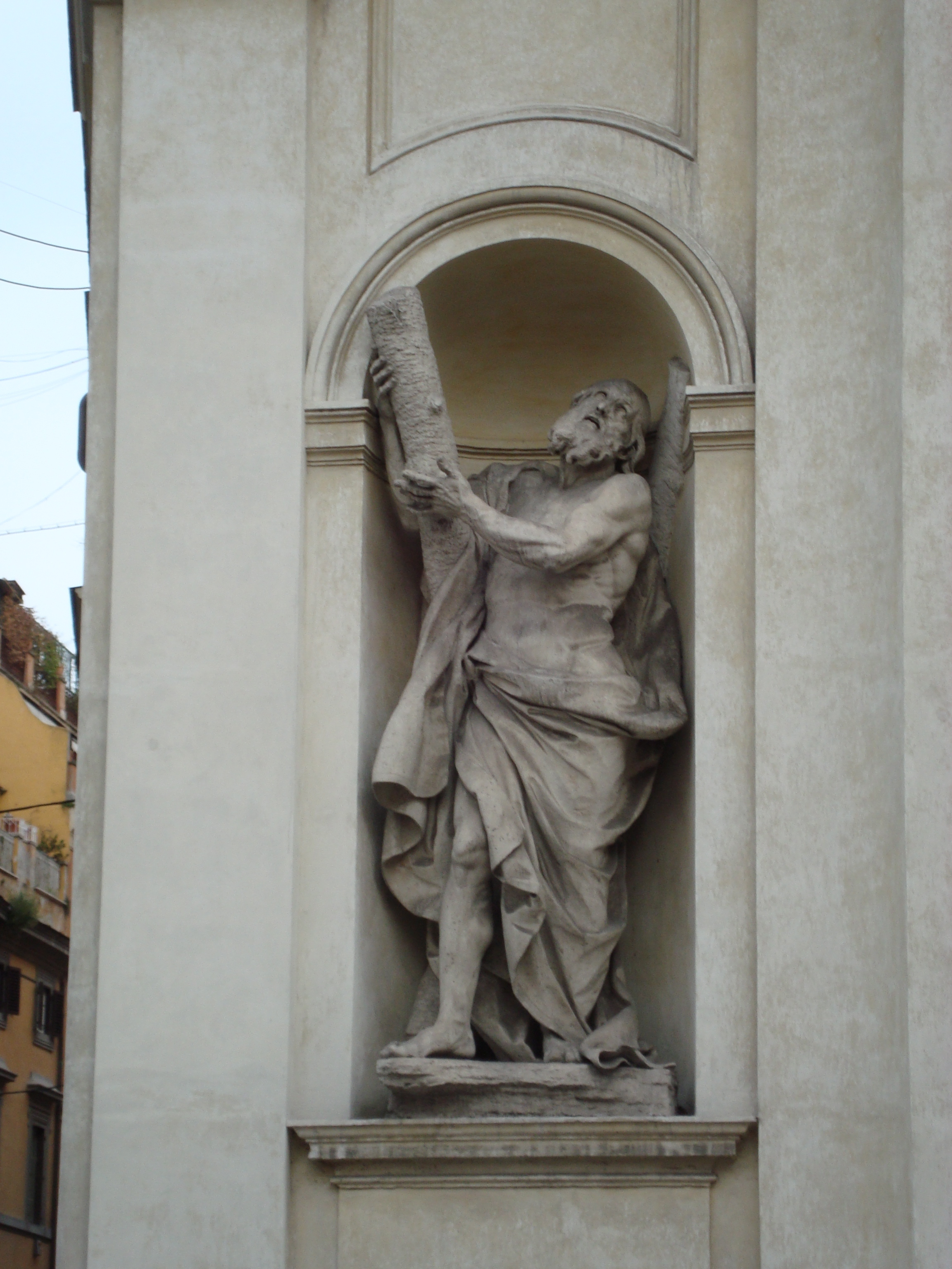 Statue de Saint André à la Chiesa dei Santi Claudio e Andrea dei Borgognoni de Rome